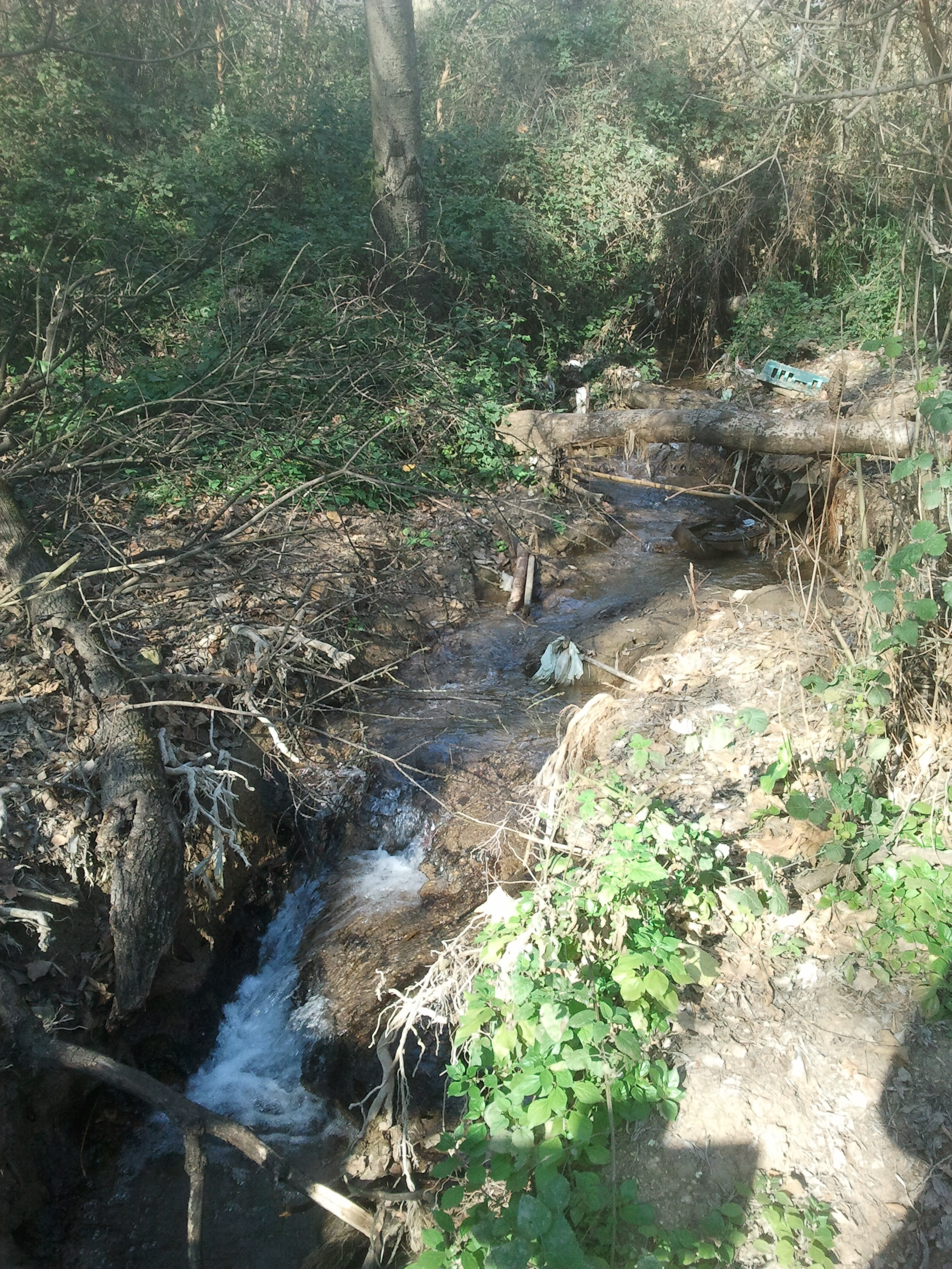 פארק הזהב הוא הפארק המרכזי העירוני בקרית שמונה. בתוכו זורם נחל עין זהב זרימה בנחל והסבך בו הוא עובר מדרום לשטח הפארק הפתוח